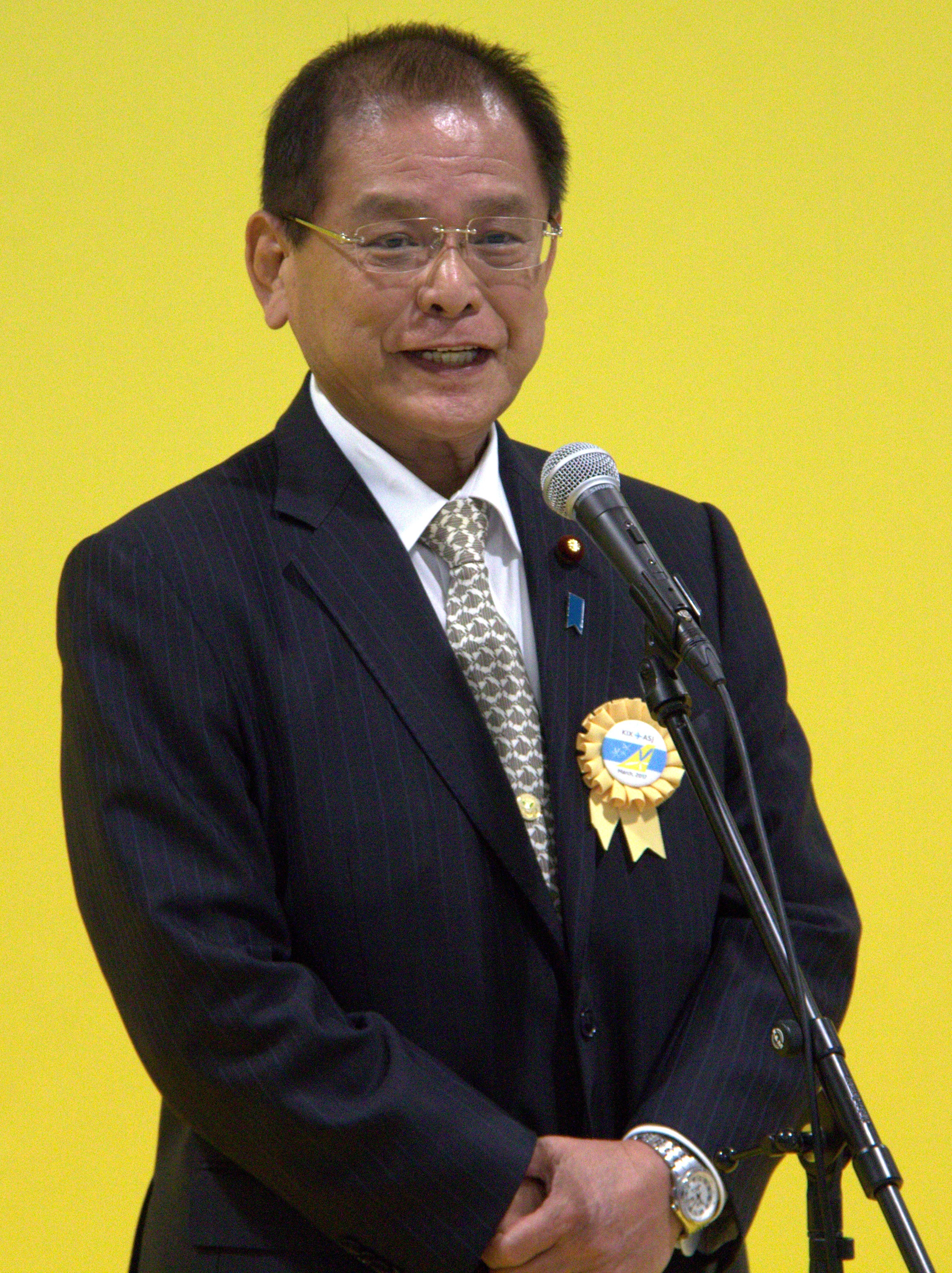 保岡興治 衆議院議員